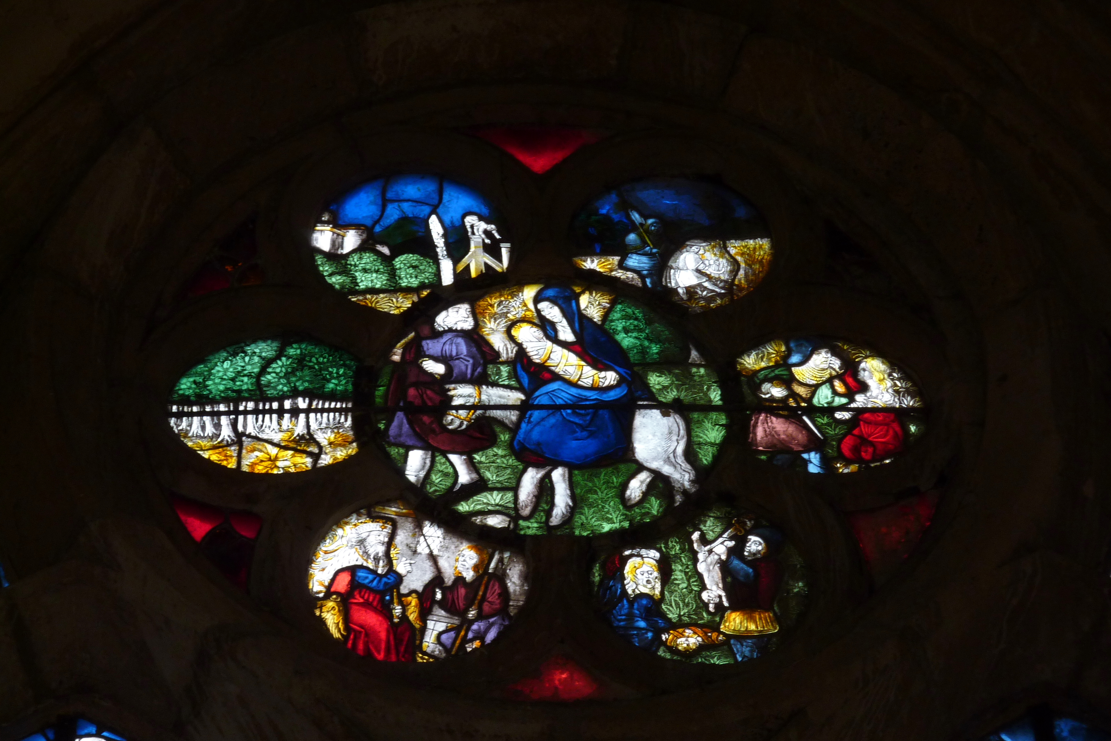 Ehemalige Kollegiatskirche Saint-Martin in Champeaux (Seine-et-Marne) im Département Seine-et-Marne in der Region Île-de-France (Frankreich), Bleiglasfenster aus dem 16. Jahrhundert, Sechspassfenster im Maßwerk, Darstellung: Flucht nach Ägypten (Mitte), Tötung der unschuldigen Kinder (außen). Fenster n° 10 nach der Numerierung von G. Leroy, 1896 (siehe Plan).